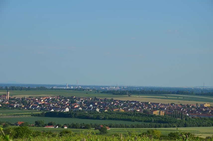 Velké Bílovice od západu